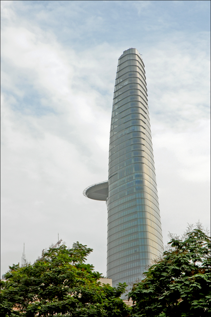 Bitexco Financial Tower Commencée en 2006, cette tour de 68 étages a été inaugurée le 31 octobre 2010. C'est actuellement le plus haut gratte-ciel du Vietnam. Le bâtiment a été construit par l'agence AREP, pilotée par les architectes ingénieurs Jean Marie Duthilleul et Etienne Tricaud. Ses formes sont inspirées d'une fleur de lotus. Extrait de l'article de Wikipedia